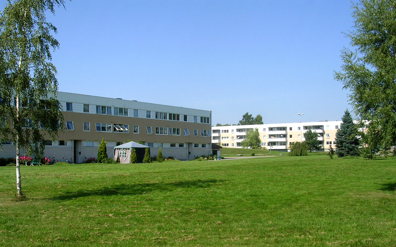 Blokkene i Vestskogen på Nøtterøy